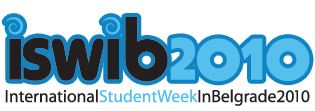 Српски (ћирилица): Лого фестивала 2010. године